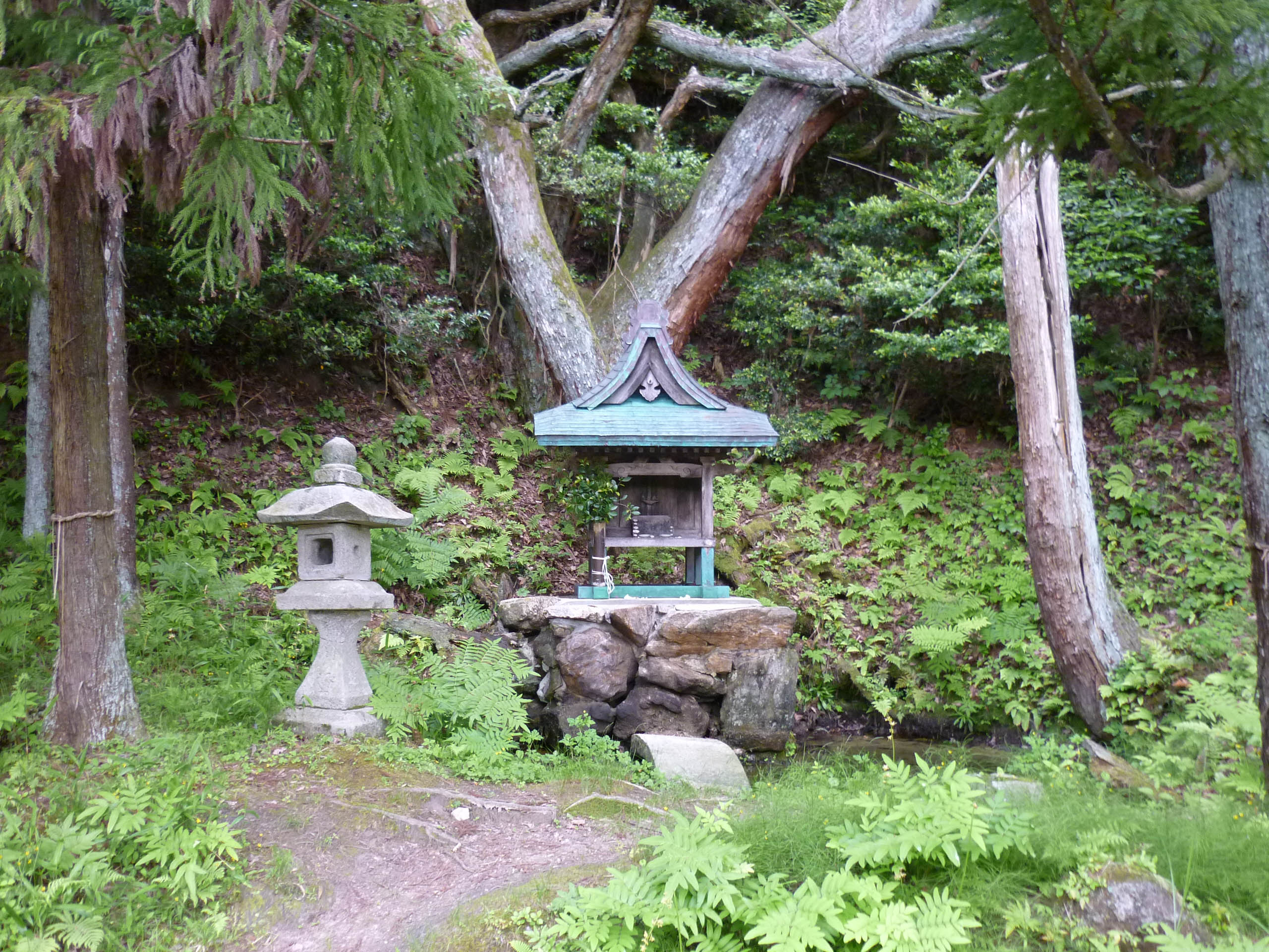 田龍王社